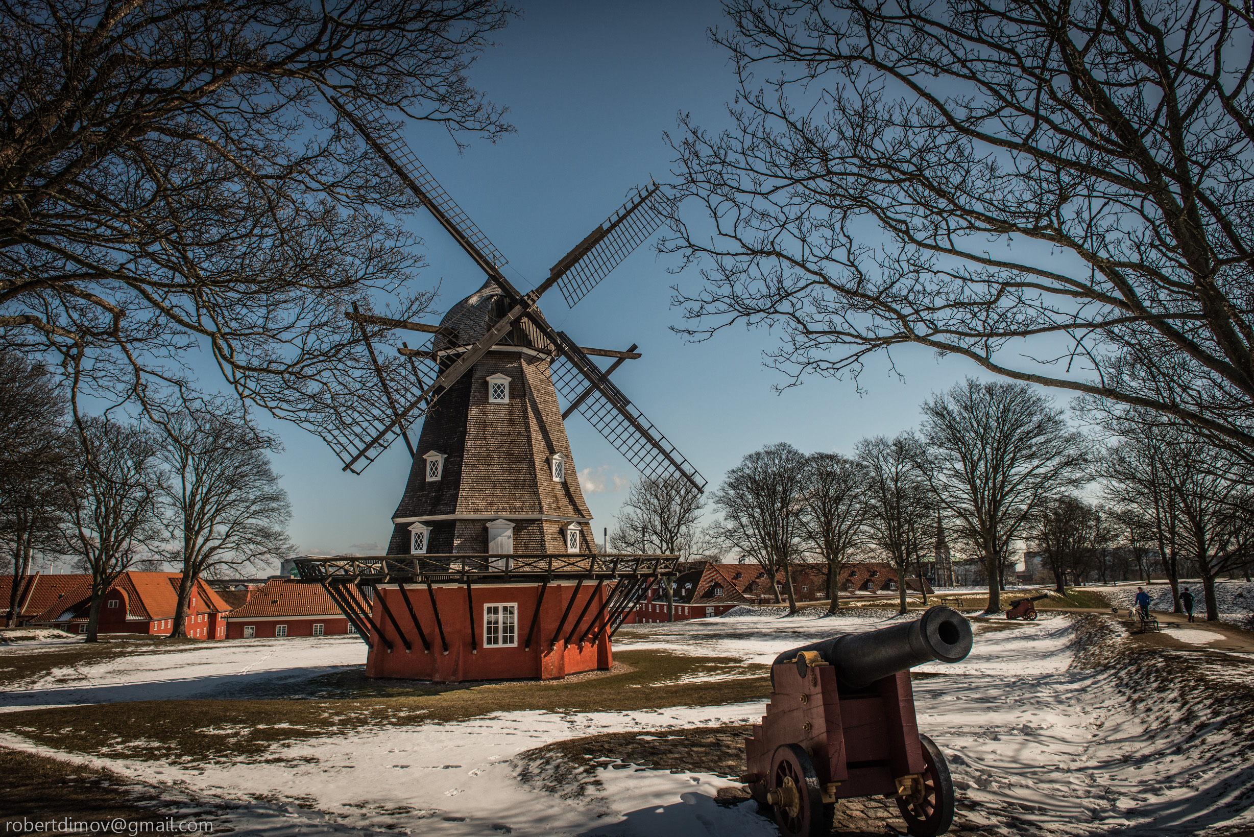 Kastelsmøllen med kanon i forgrunden